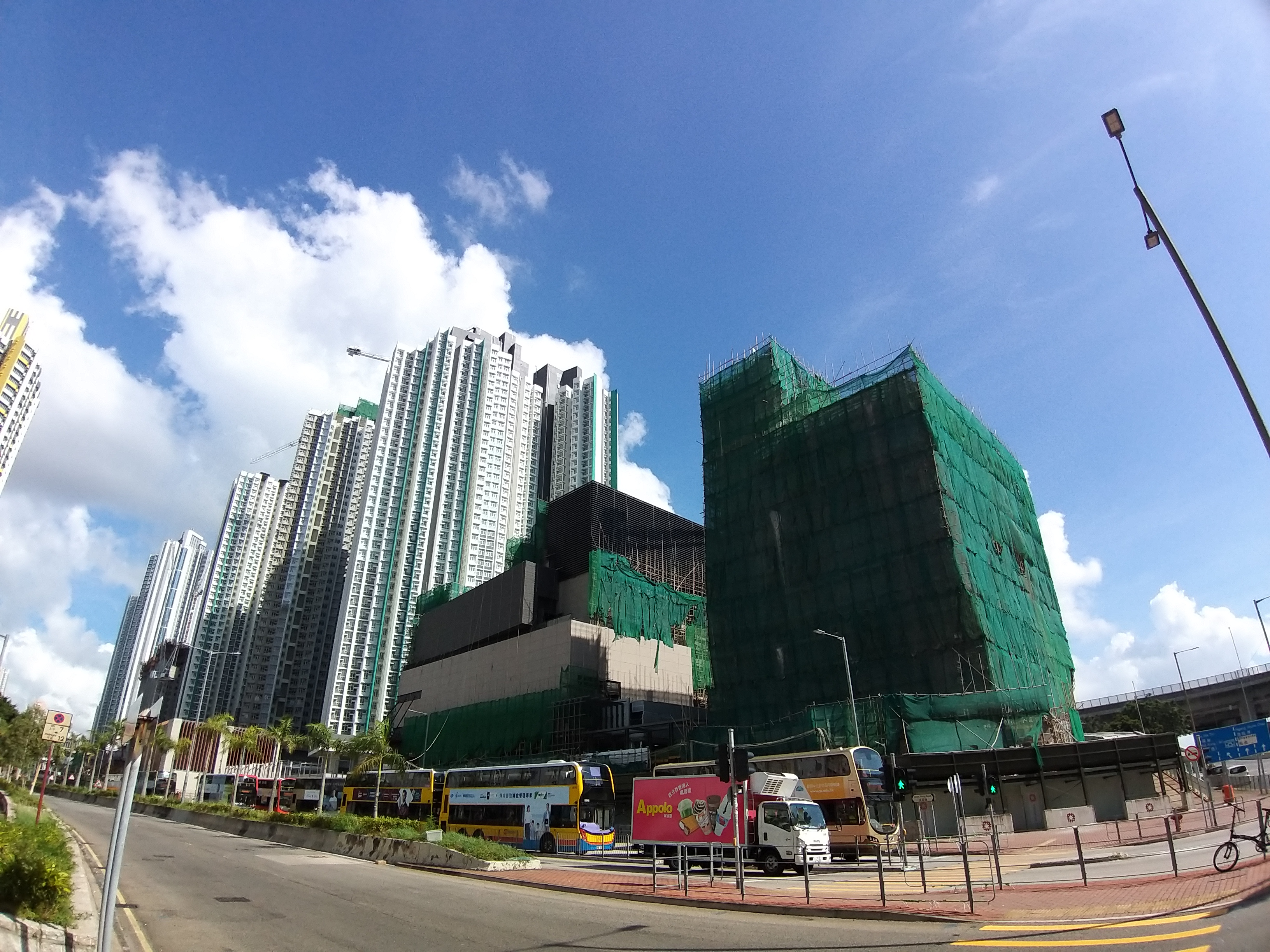 見證深水埗一個新公屋住宅群的誕生